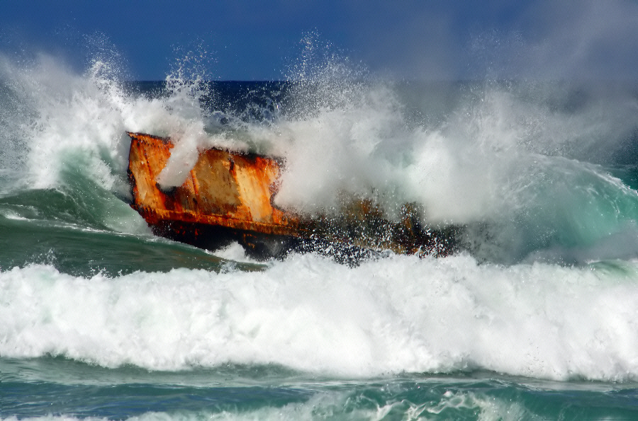 Der letzte sichtbare Teil einer großen alten Dame der Weltmeere.